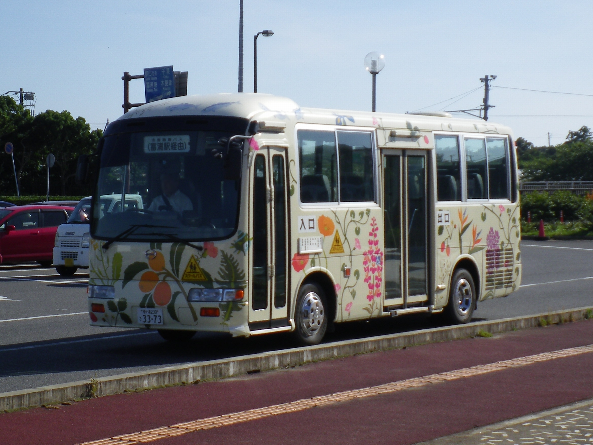 日野・リエッセ 袖ケ浦230さ3373 千葉県南房総市・とみうら枇杷倶楽部にて投稿者本人が撮影。